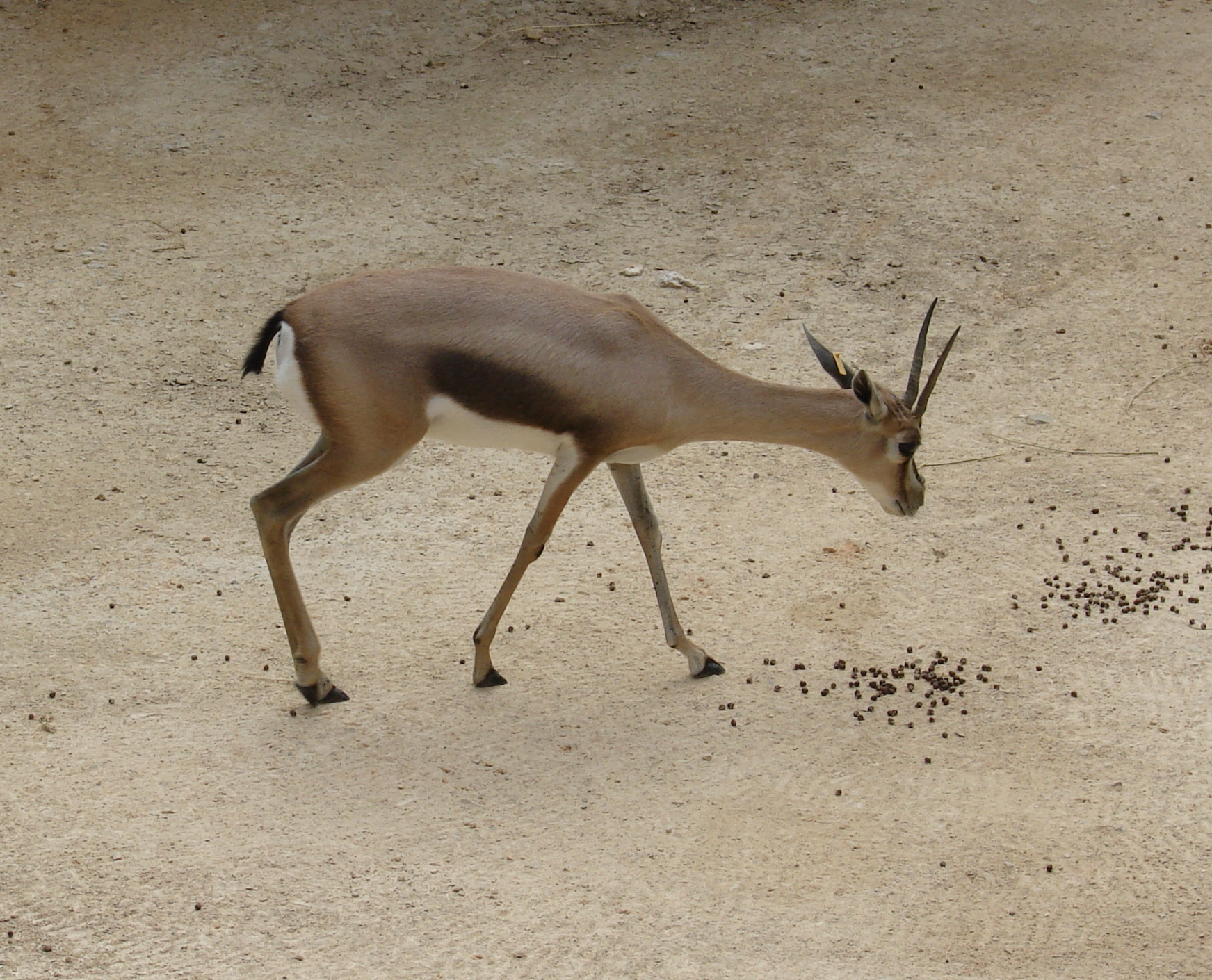 Taken at San Antonio Zoo